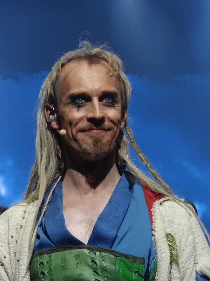 David Alexis dans le rôle de Merlin dans la comédie musicale La légende du roi Arthur au Palais des congrès de Paris, lors d'une représentation en septembre 2015